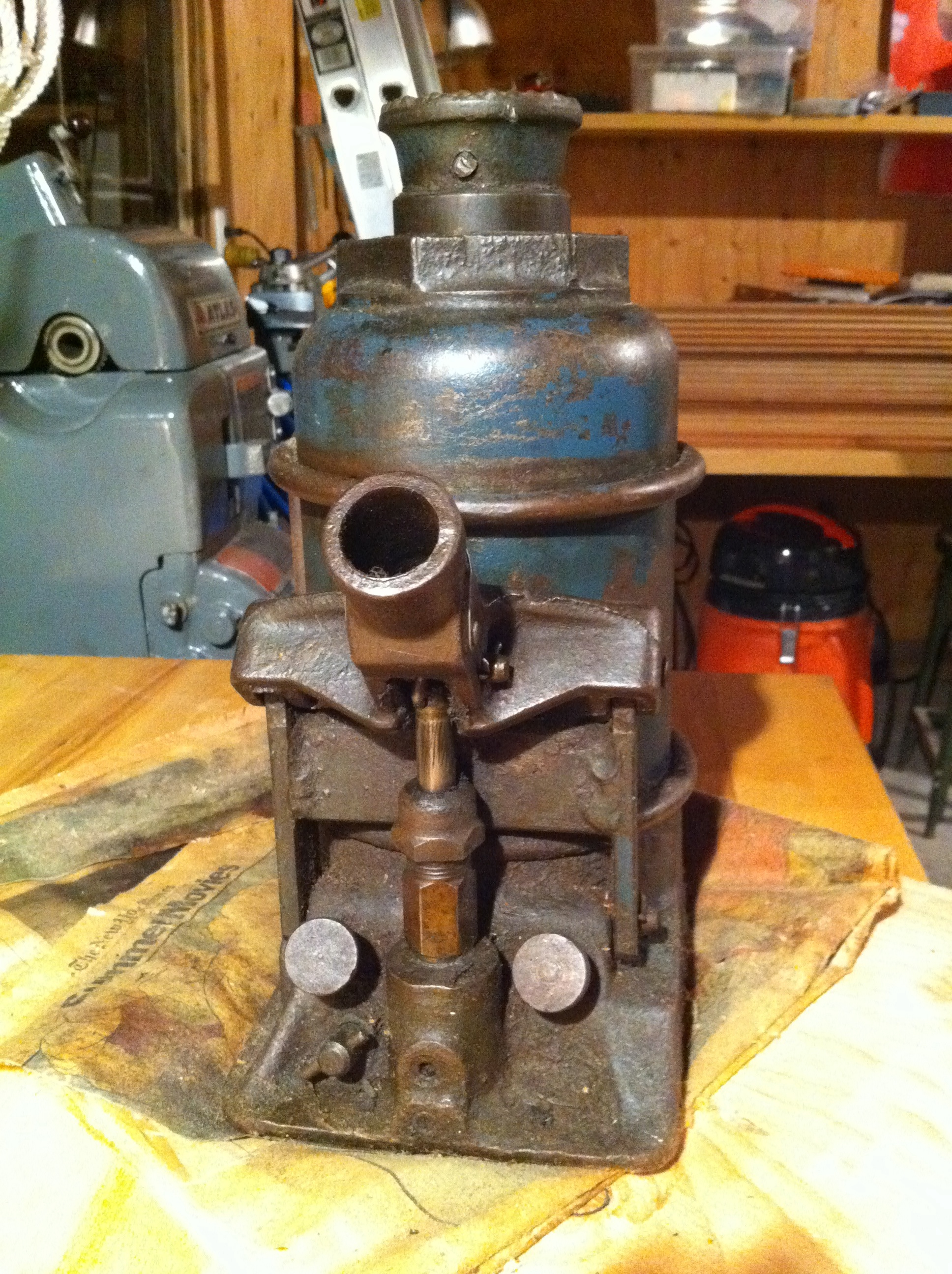 Walker 950 bottle jack